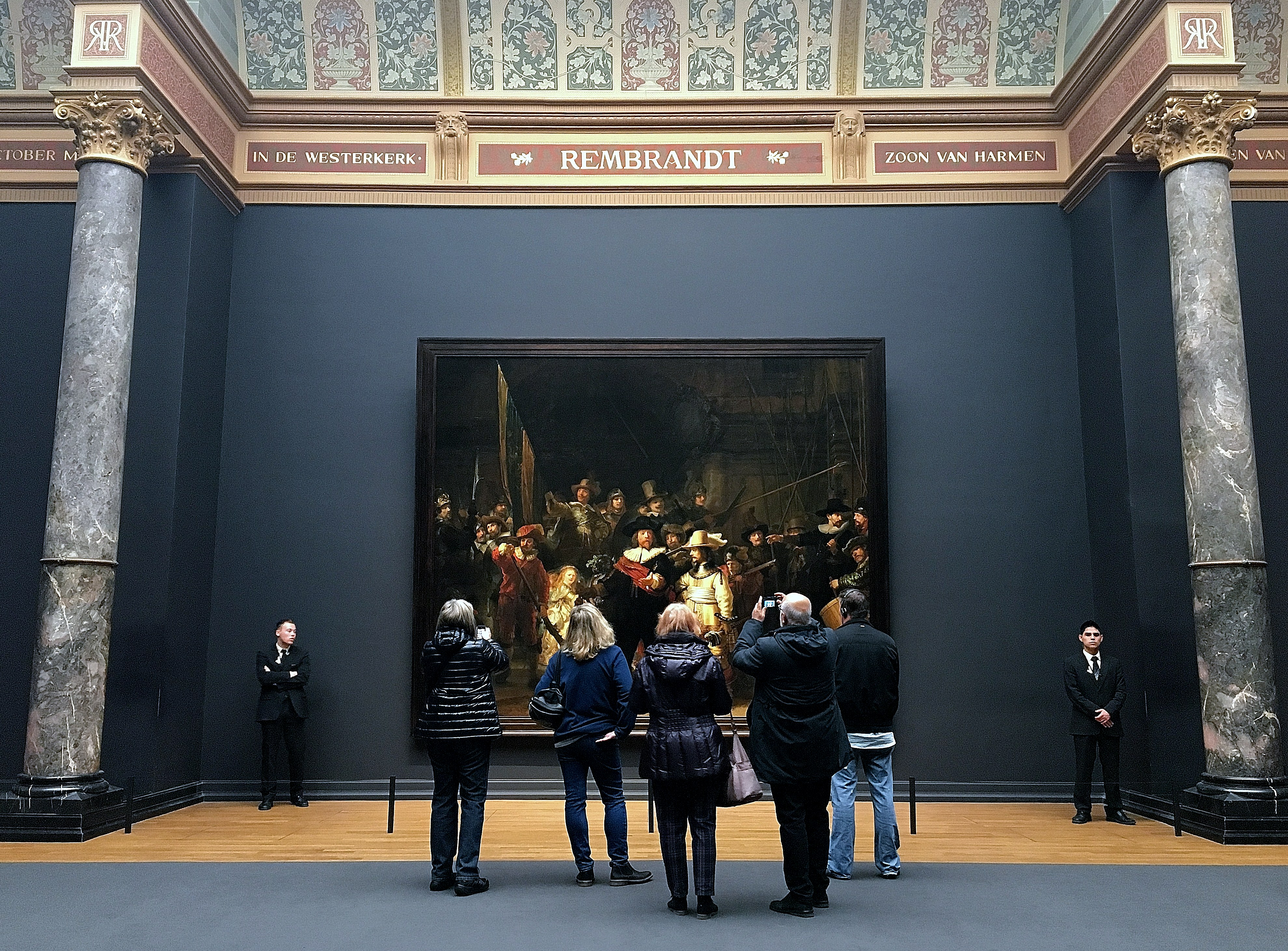 De Nachtwacht van Rembrandt van Rijn in het Rijksmuseum Amsterdam in Amsterdam